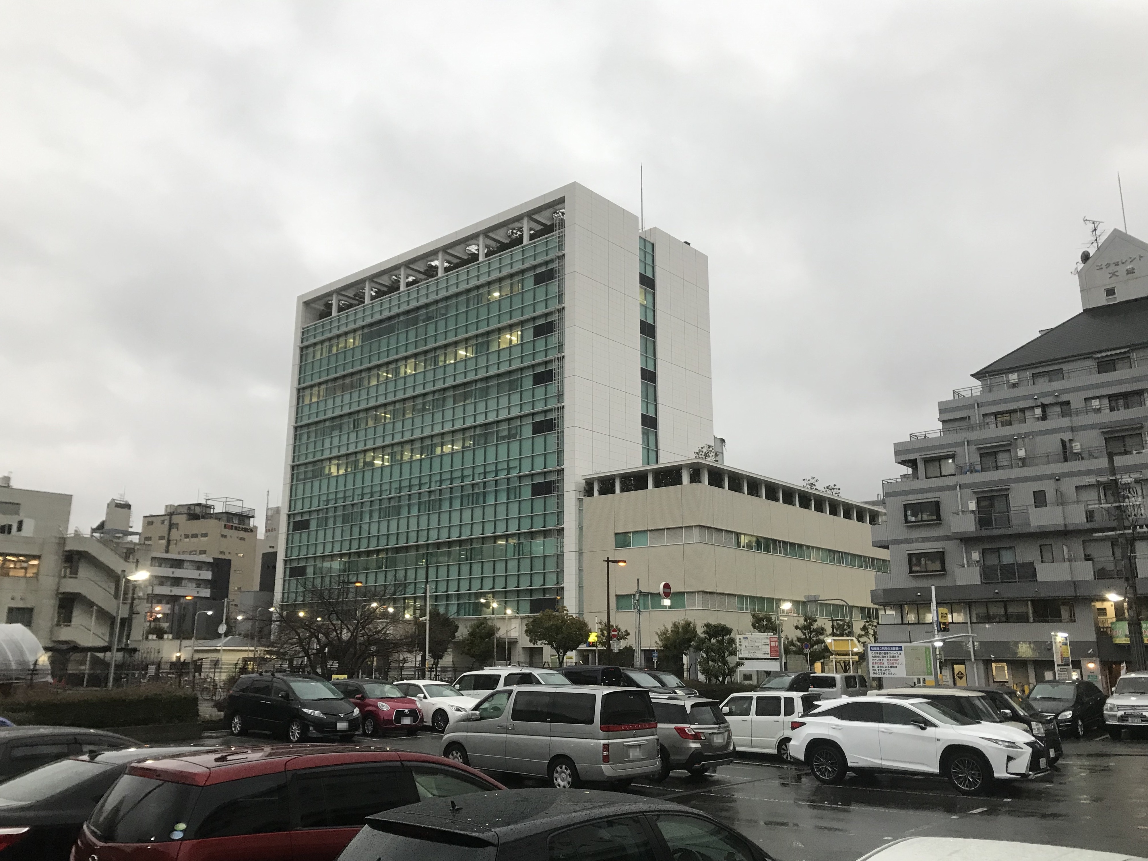 大阪市西成区役所